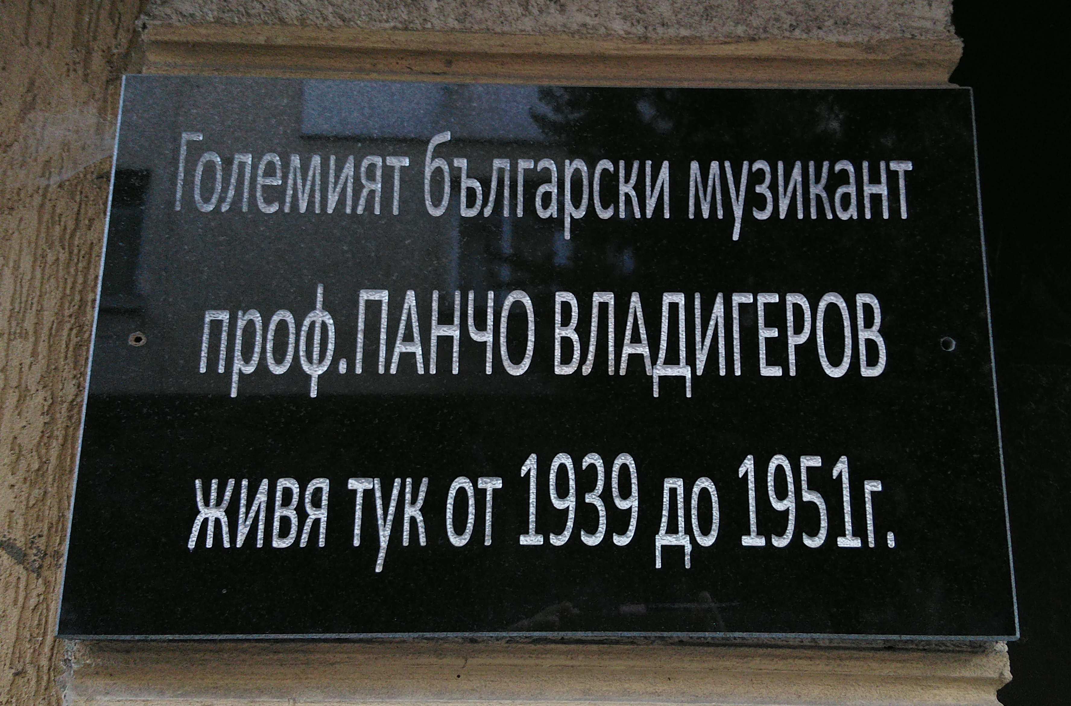 Poncho Vladigerov memorial plaque, 24 Parensov Str., Sofia